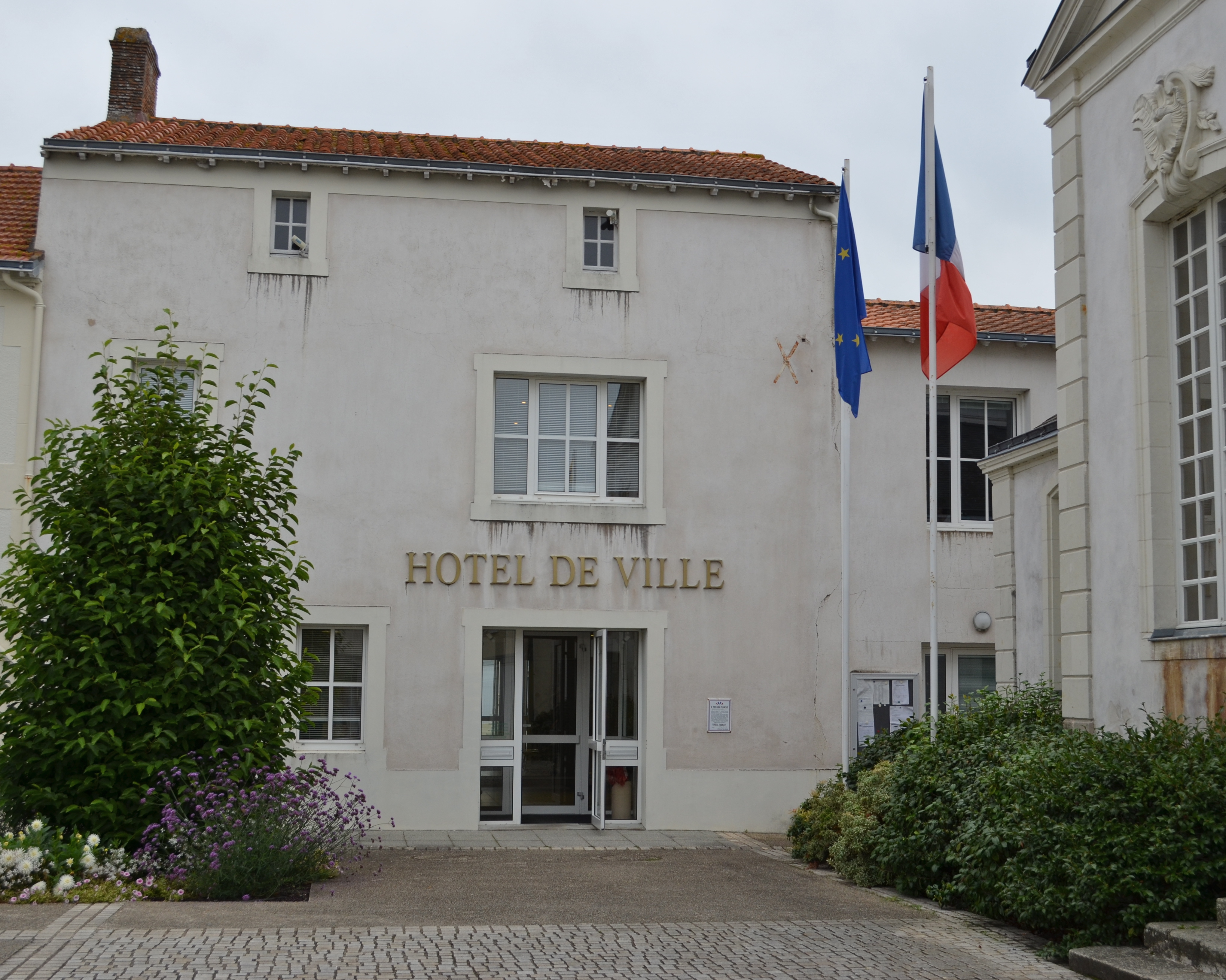 Hôtel de Ville - Machecoul (Loire-Atlantique)